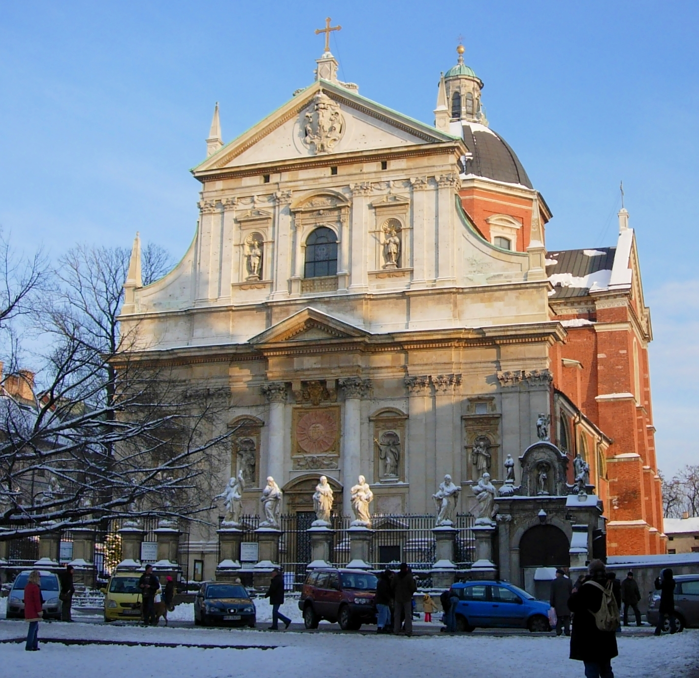 Ss. Peter and Paul church, Kraków, Poland